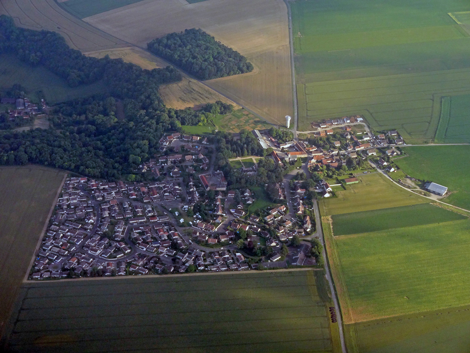 Vue aérienne d'Auvillers, commune de Neuilly-sous-Clermont (Oise), France.